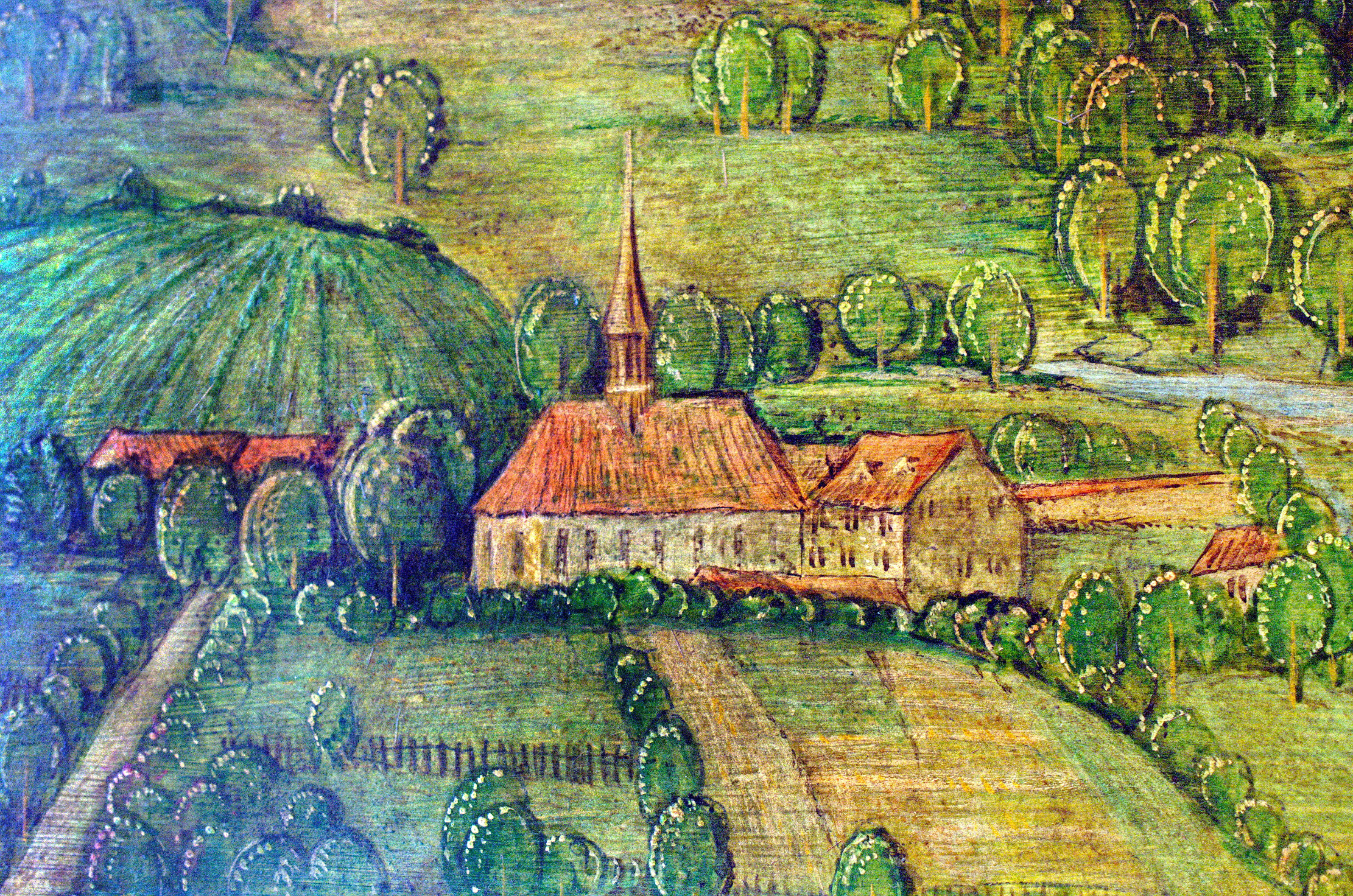 Das Kloster Selnau auf der Replik der Altartafeln von Hans Leu im Baugeschichtlichen Archiv der Stadt Zürich im Haus zum Rech. Die Panoramansicht des linksseitigen Limmatufers – 'Standort' der BetrachterIn ist wohl der Karlsturm des Grossmünsters – von Hans Leu d. Ä. gilt als die älteste zuverlässige Darstellung der Stadt Zürich, Ende des 15. Jahrhunderts auf den Altartafeln im Grossmünster mit viel Liebe zum Detail festgehalten. Die originalen Tafeln sind heute im Landesmuseum ausgestellt, eine (vermutlich) 1:1 Replik ist im Stadtarchiv öffentlich zugänglich.